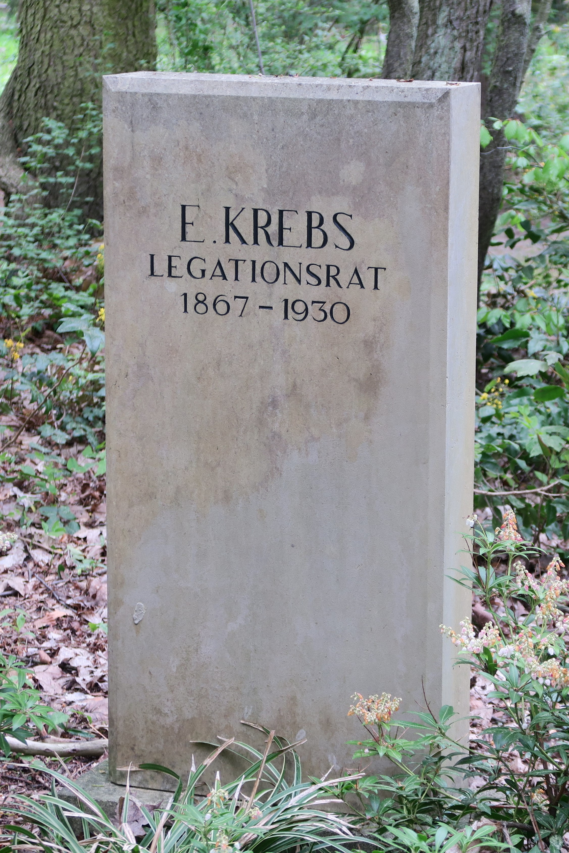 Emil Krebs Grabstein Stahnsdorf